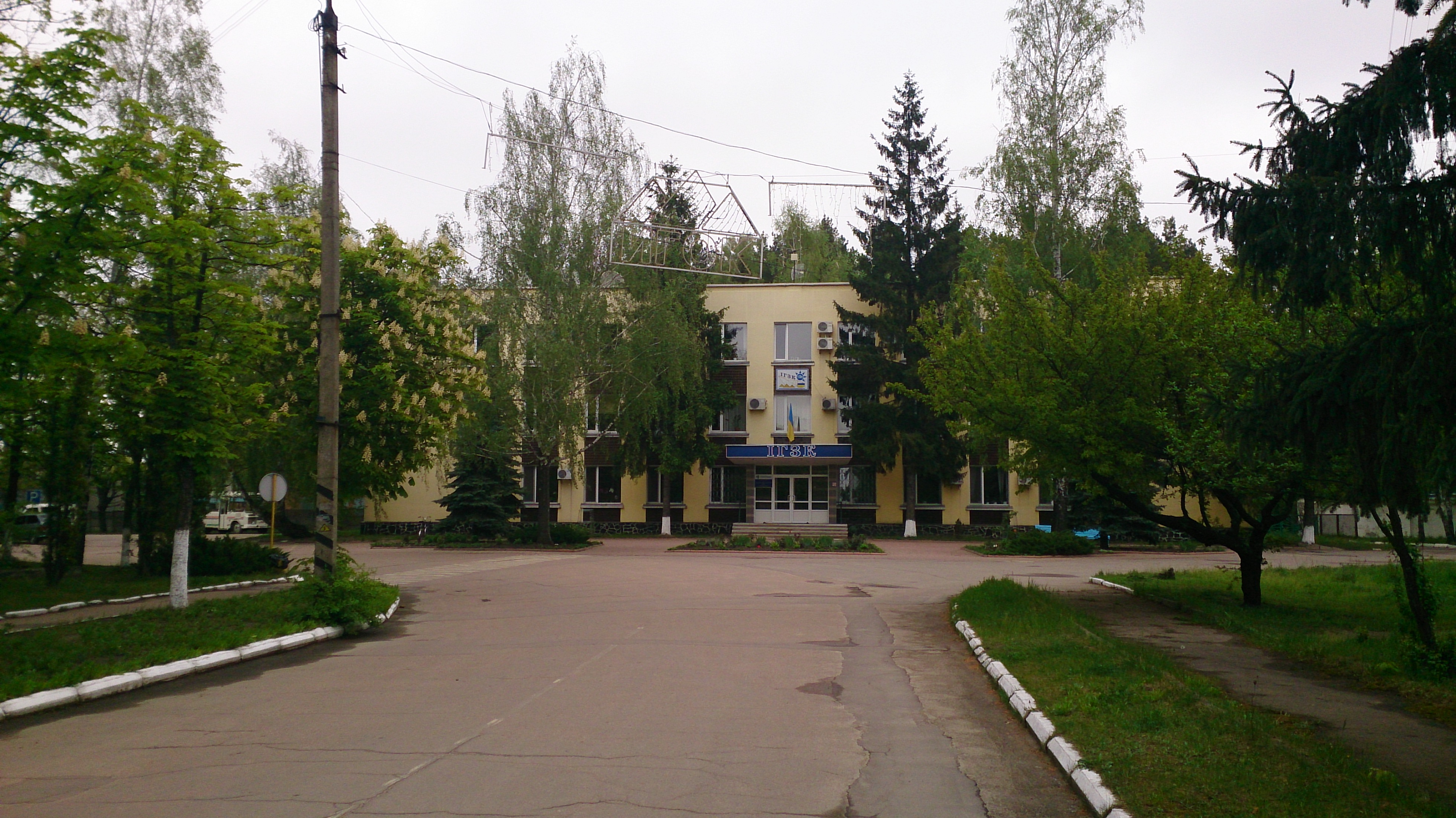 Іршанський ГЗК